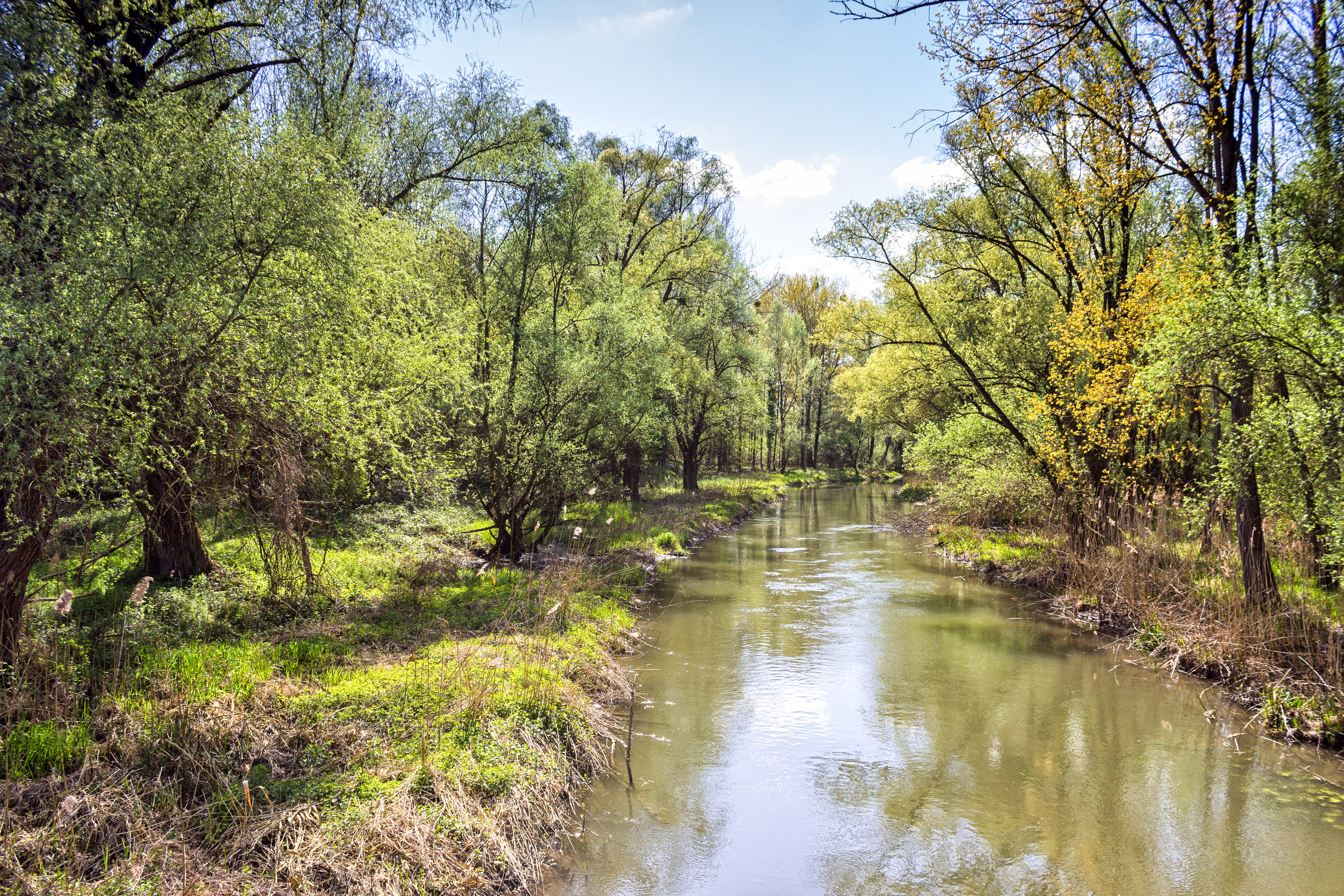 Das Bild wurde bei Russheim aufgenommen auf der Brücke zu Elisabethenwörth